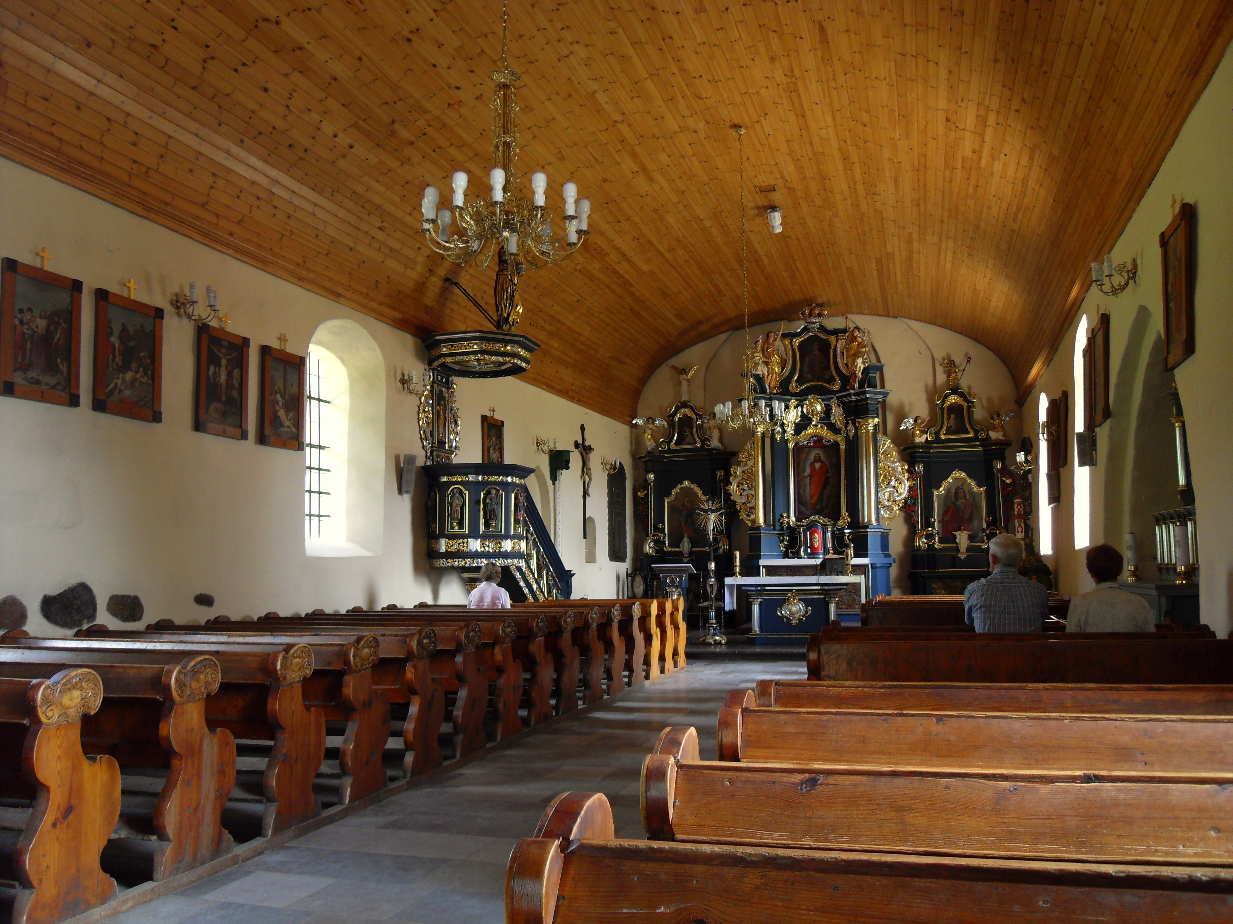 Gdańsk Matarnia, kościół świętego Walentego.